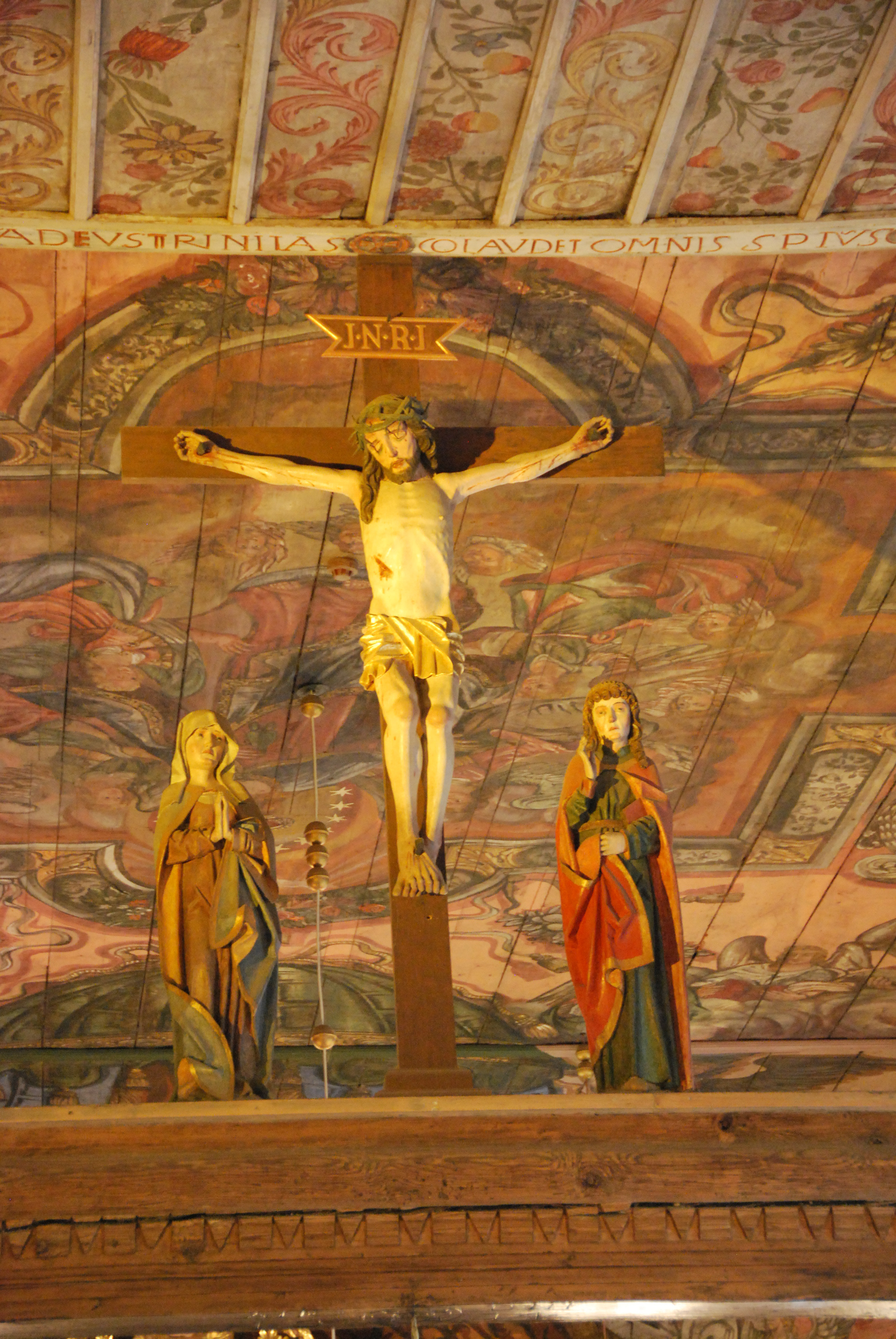 Gąsawa, wnętrze XVII-wiecznego kościółka pw. św. Mikołaja